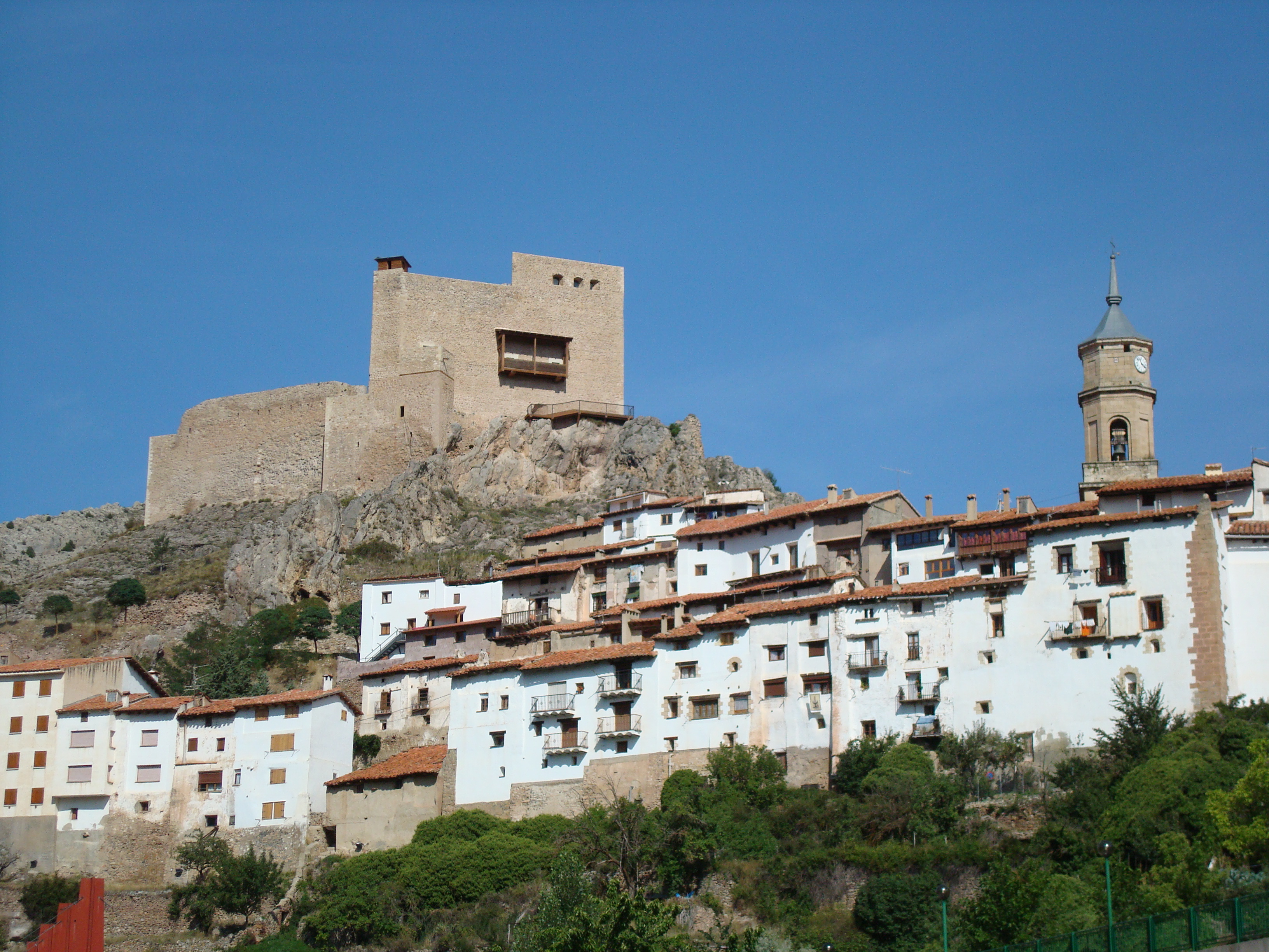 Visió general de la població d'Alcalà de la Selva (Aragó)